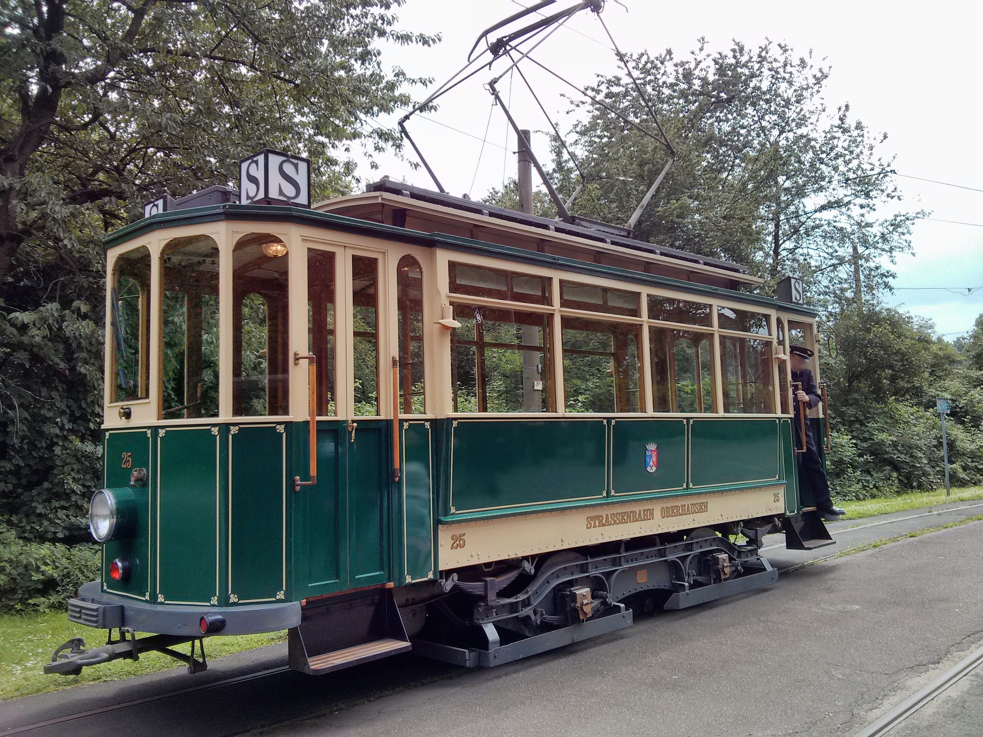 TW 25, Historischer Triebwagen der STOAG, Oberhausen, gebaut 1899 von P. Herbrand & Cie